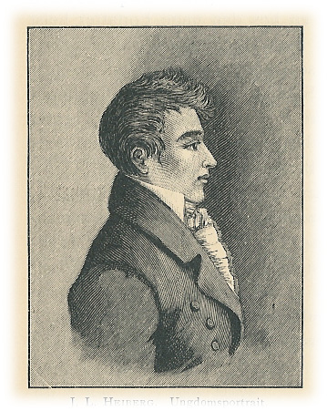 Ungdomsportræt af Johan Ludvig Heiberg.